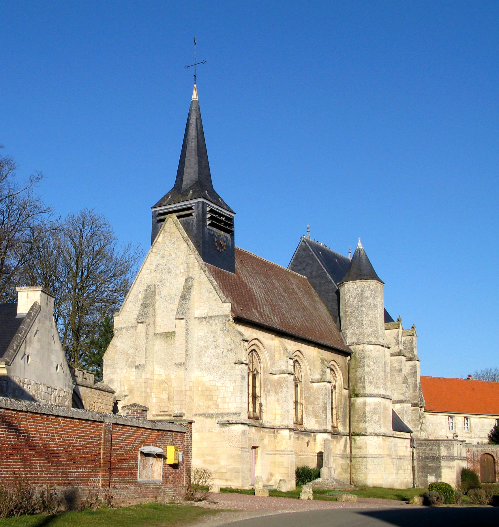 Folleville (Somme, France) - L'église. . .